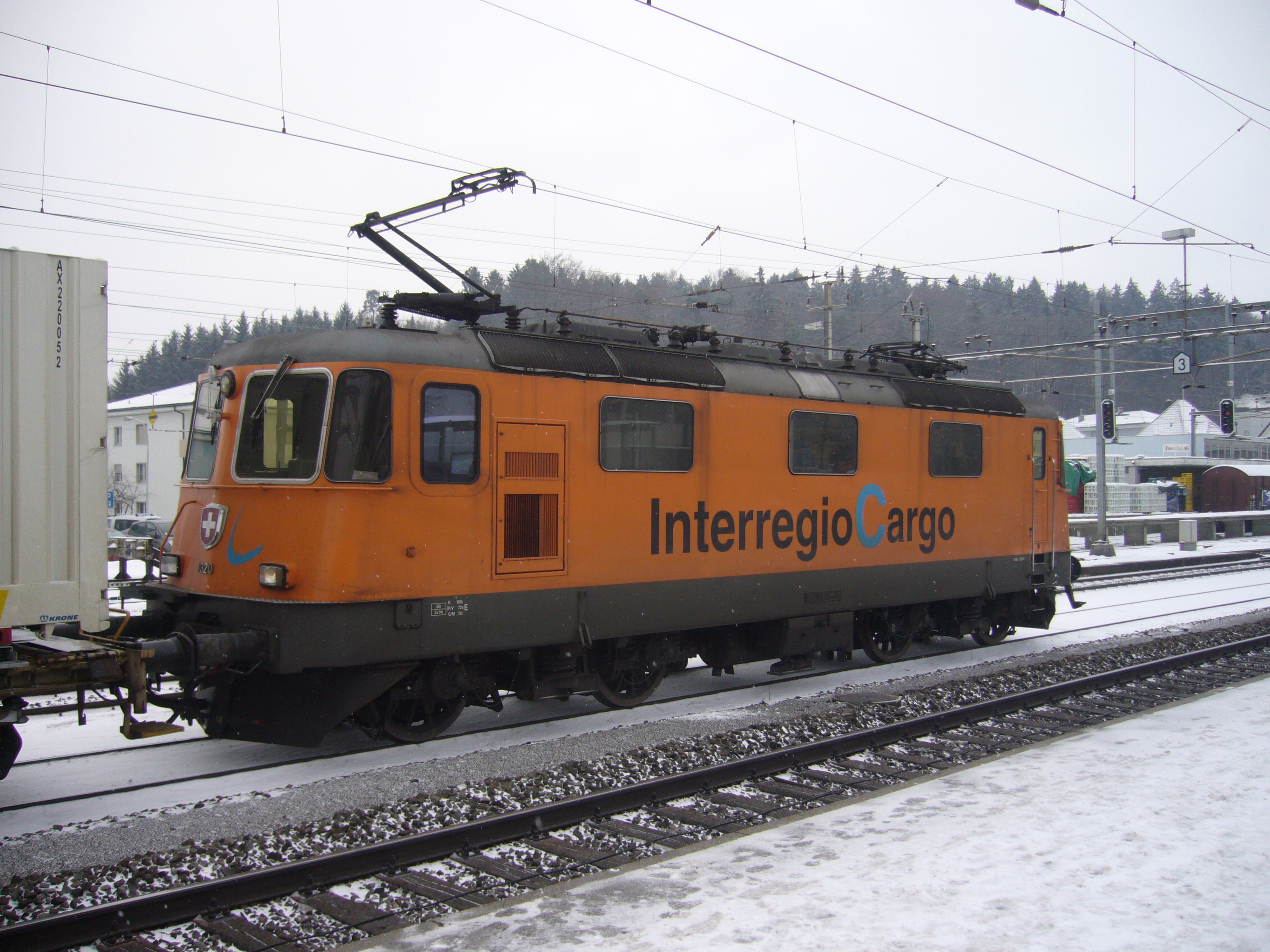 Locomotive Re 4/4II 11320 mit orange-farber InterregioCargo-Bemalung vor Container-Zug im Bahnhof Effretikon.